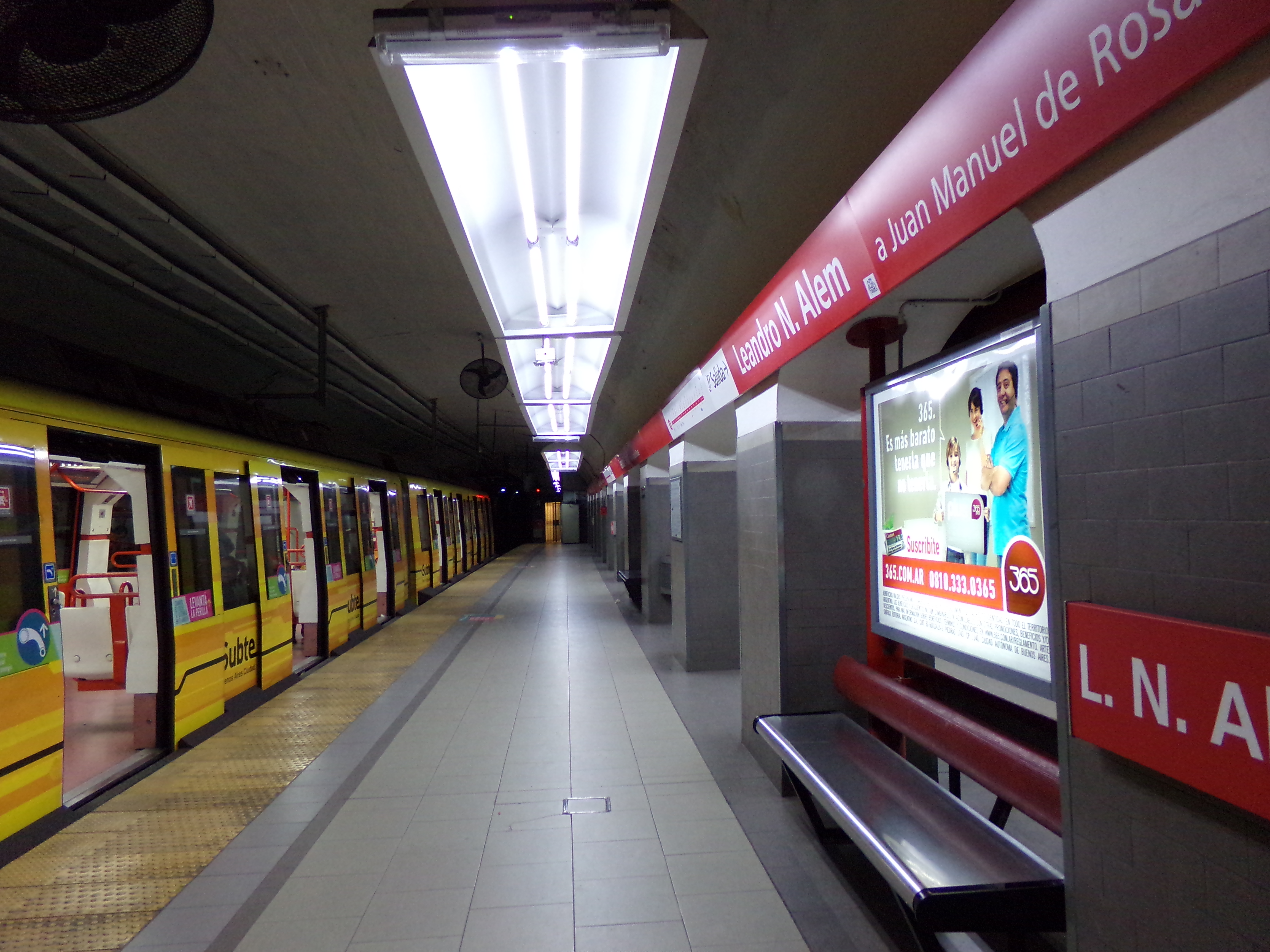 Estación Alem, línea B